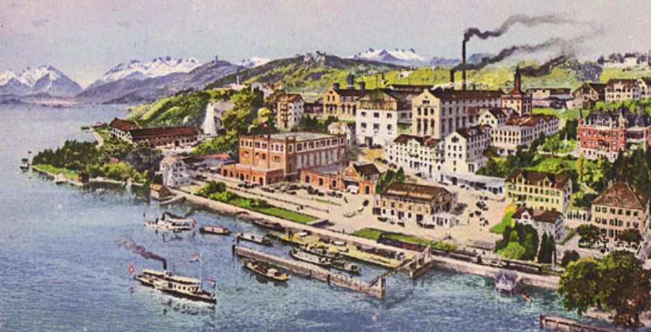 Brauerei Wädenswil, Wädenswil ZH, Schweiz: Postkarte von 1910